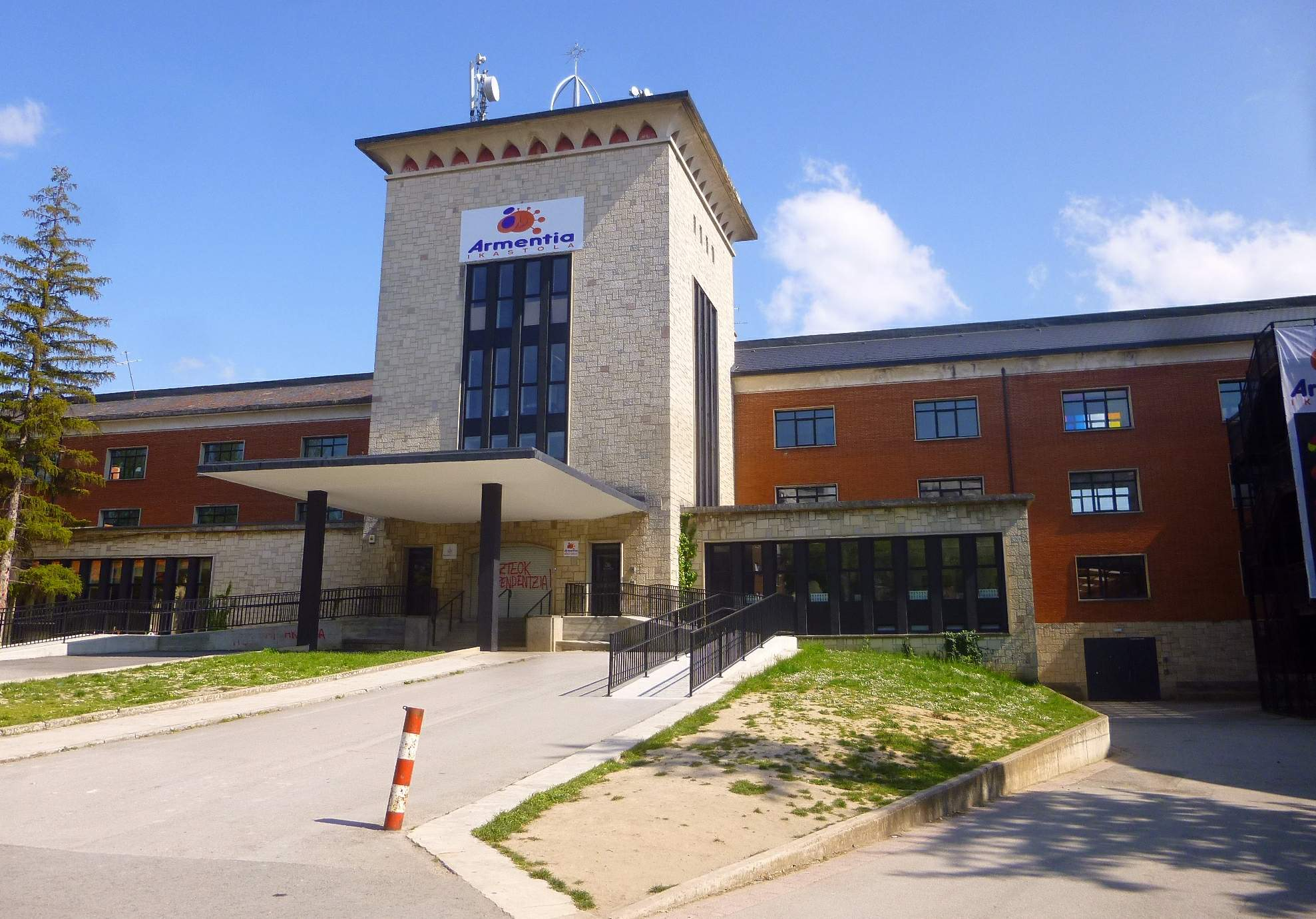 Ikastola Armentia (Vitoria)